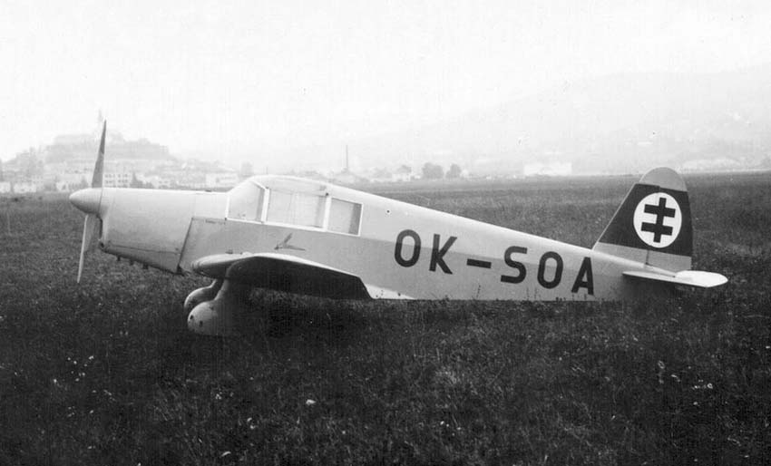 Mráz Zobor I (OK-SOA)